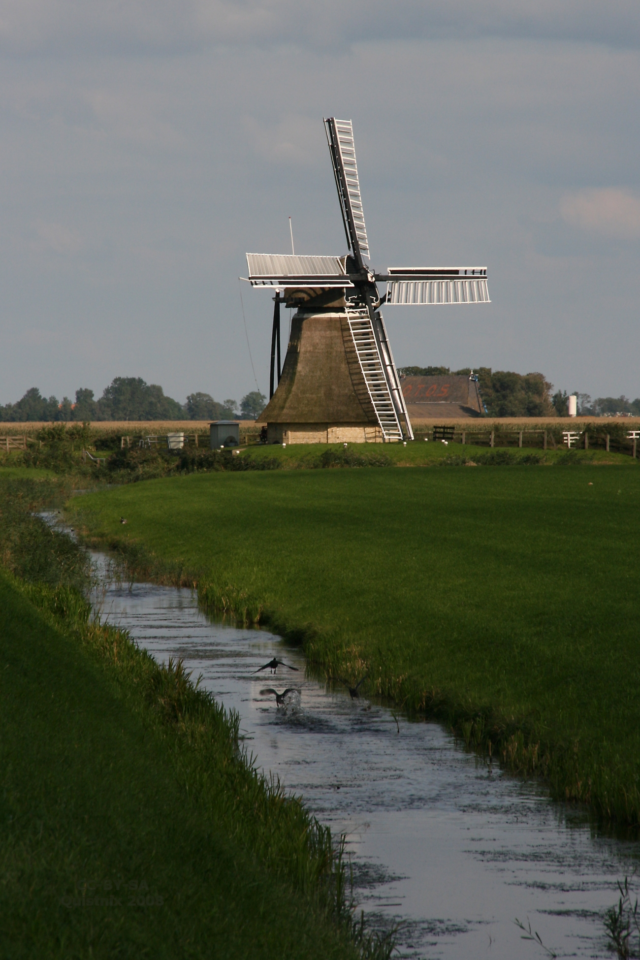 Burgwerd: De Aylvapoldermolen